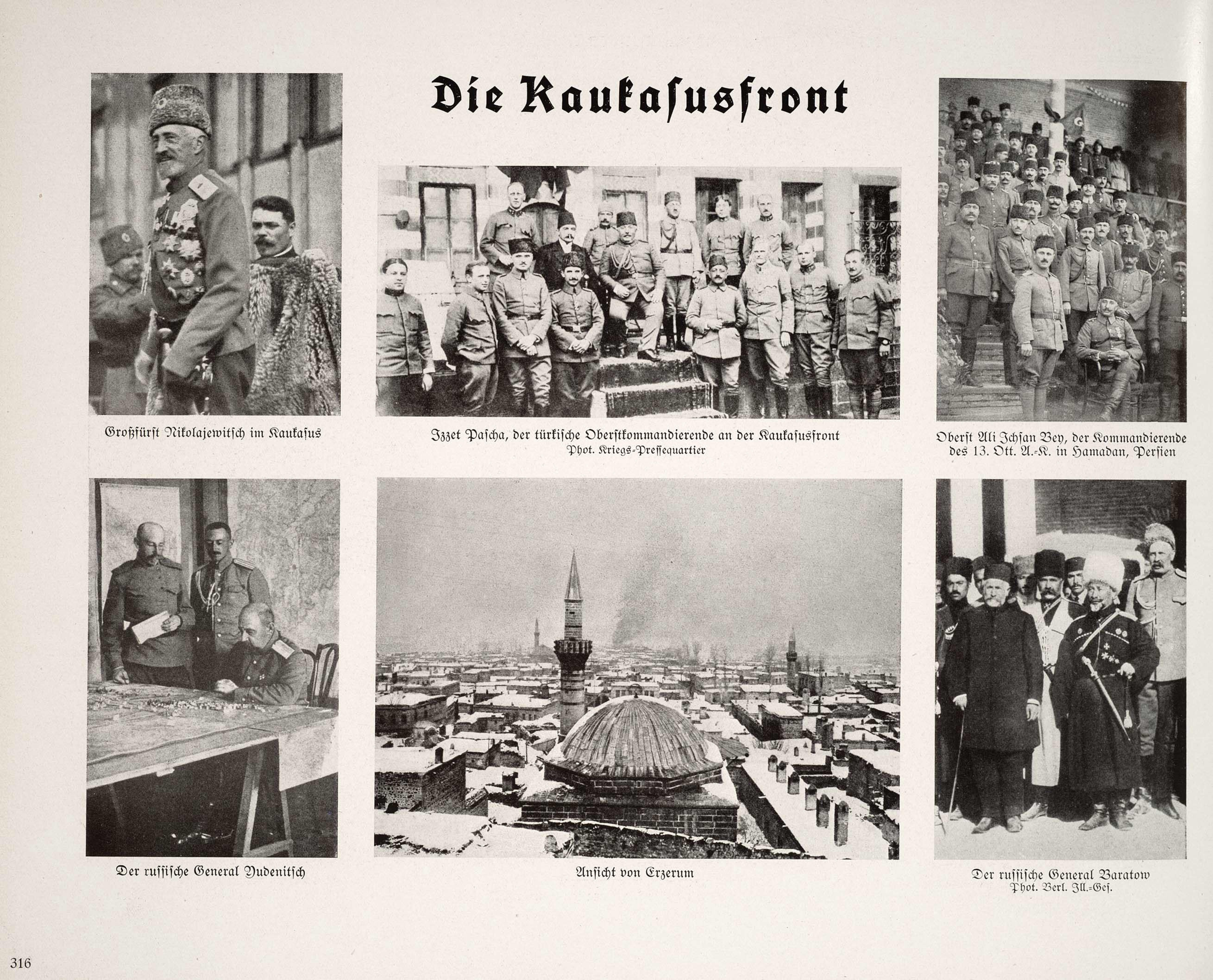 Die Kaukasusfront